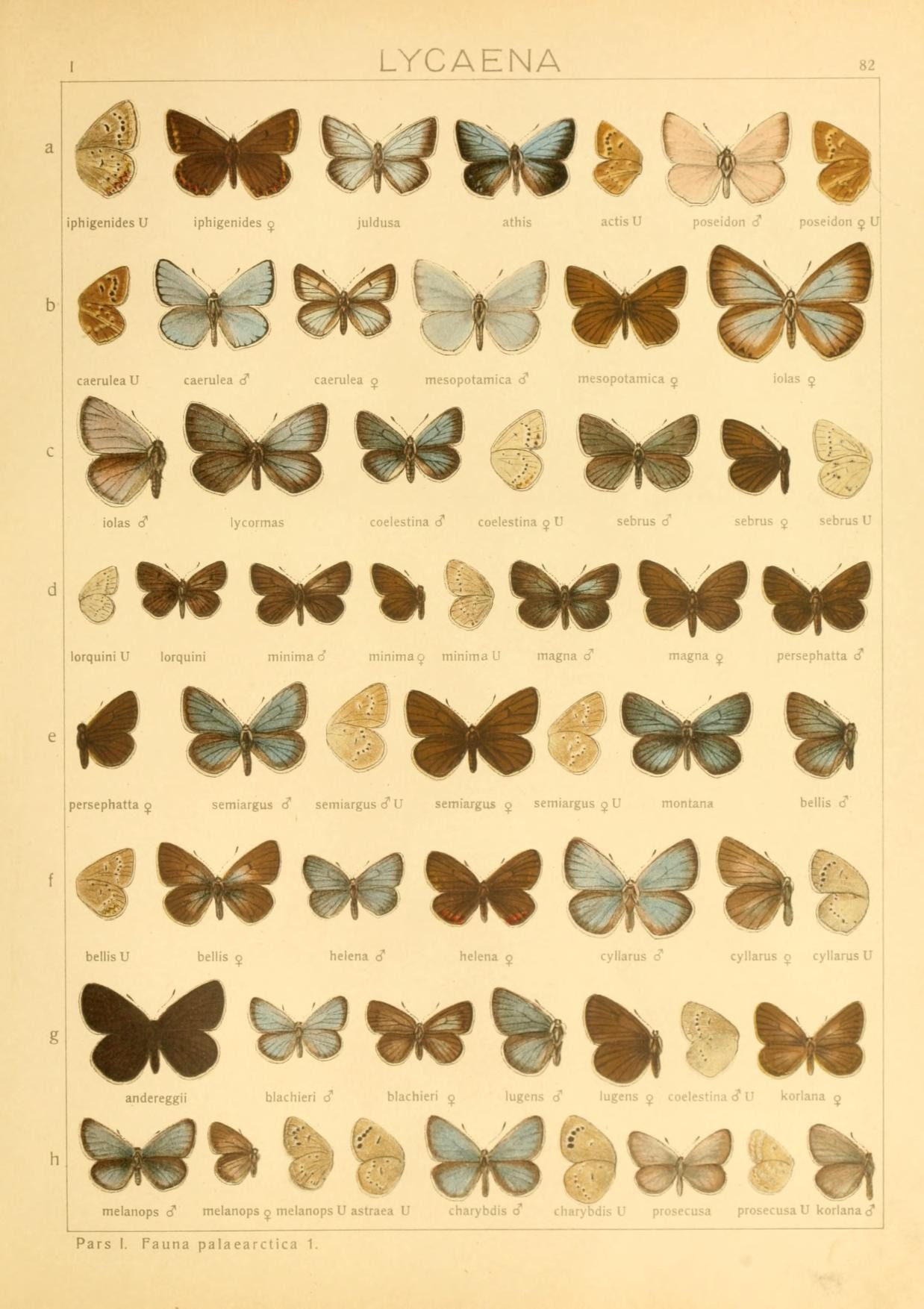 LYCAENA iphigenidesU iphigenides ^ jiildiisa athis actis M posoidon c?" poseidon 5 Ui caerulea U catruka - LacrulL-a o m_ ■■■, .',i:i' , au-sopoiamica ^ ^1 ^^'^ ^l@ J 9lV .Pl k-stina d" coelestina o U sebrus 0' sehrus ^ scbrus WW%i^«€WW lorquin) i lorquini mini " ^^W W ^w ™ persephatta ^ semiargus o' seimargus o" C semio/gus ^. sciiiuirgus .^ U montana bellis cj" w WW %i# vi€ cu ^ '^ bellis U bellis 5 Helena (i* Helena 5 cyllarus 3 cyllanis 5 cyllarus U andereggii blachieri d" blachieri 5 lugens d" lugens j coelestina d" l' korlana ^ melanops d* melanops 5 melanops U astraea U charybdis o l. . u^ecusa prosecusaU korlana c? Pars I. Pauna palaearctica 1.